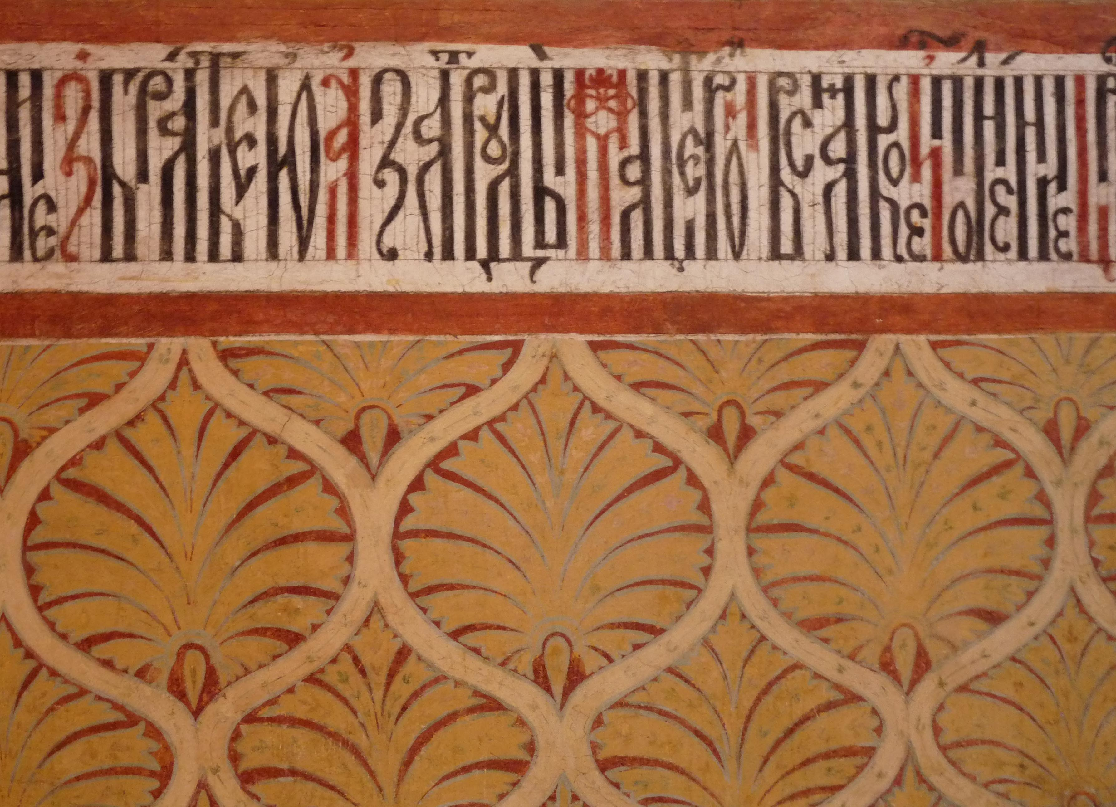 Kostroma Ipayevsky Monastery 22